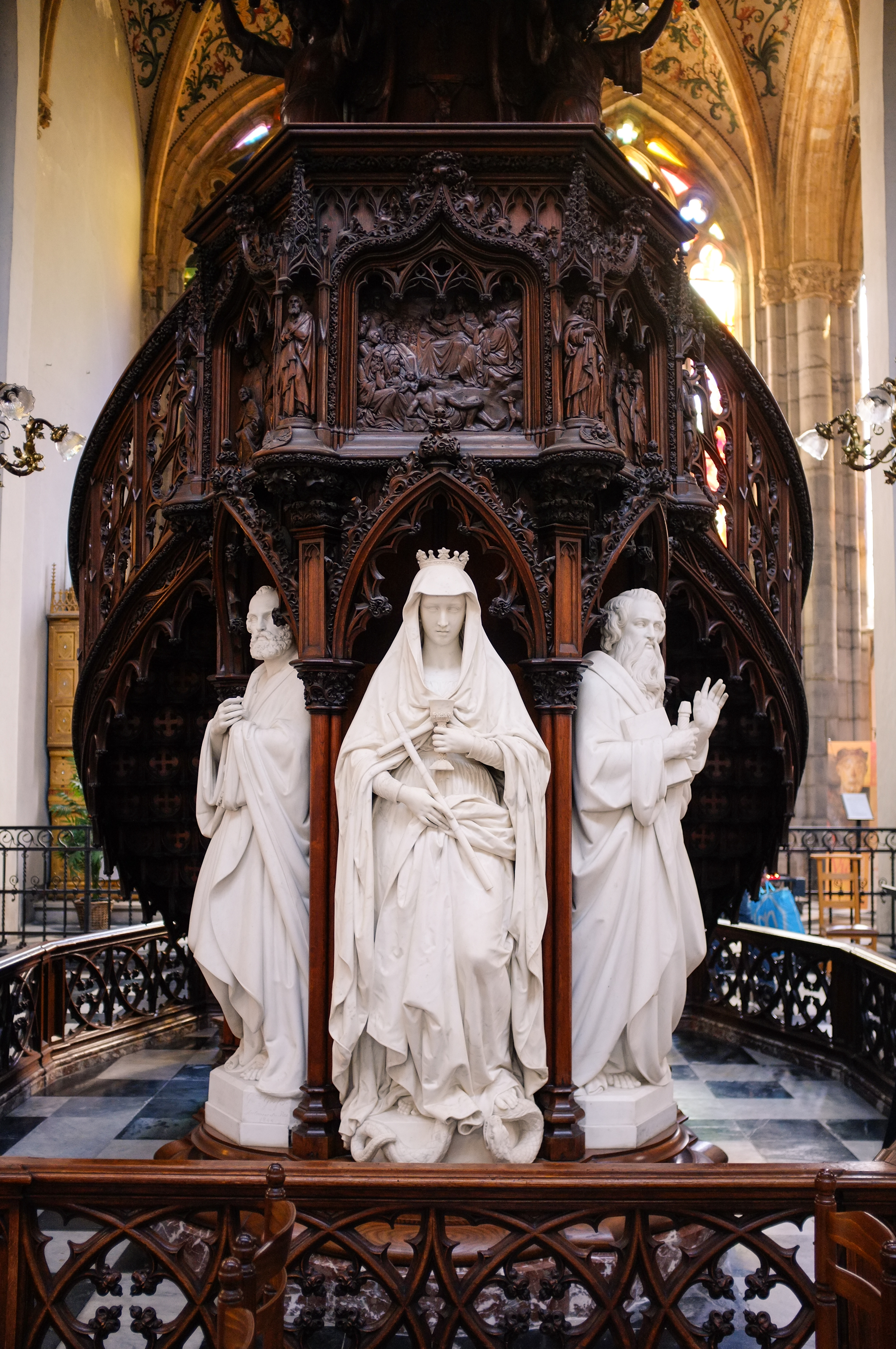 Fujifilm FinePix X100 | 1/60sec, f/2.0, ISO 800